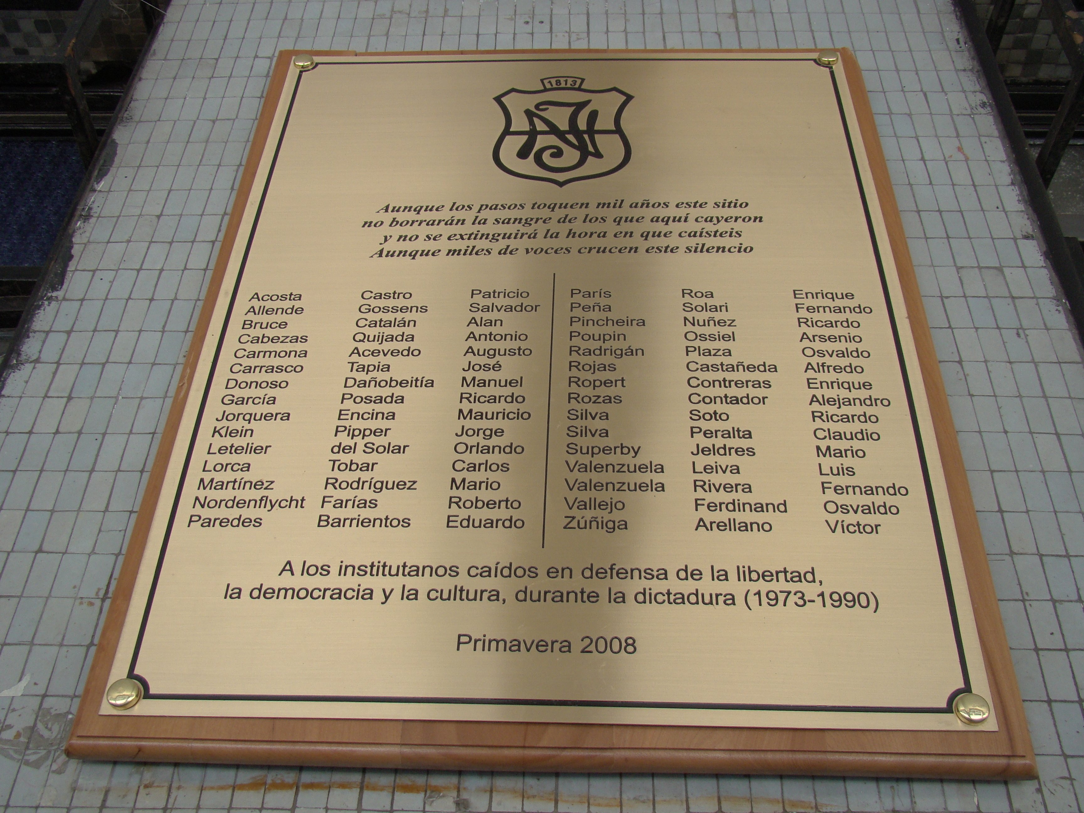 Memorial conmemorativo de la violación de los DDHH en Chile durante el régimen de Pinochet